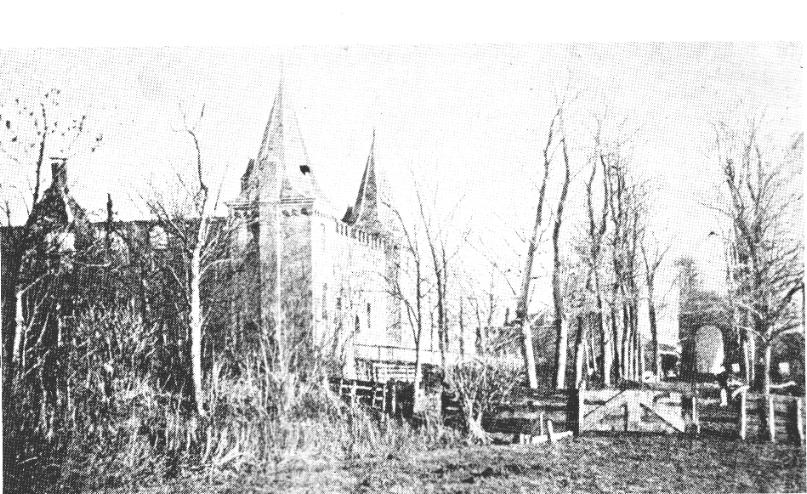 Foto van het voormalige slot Ilpenstein